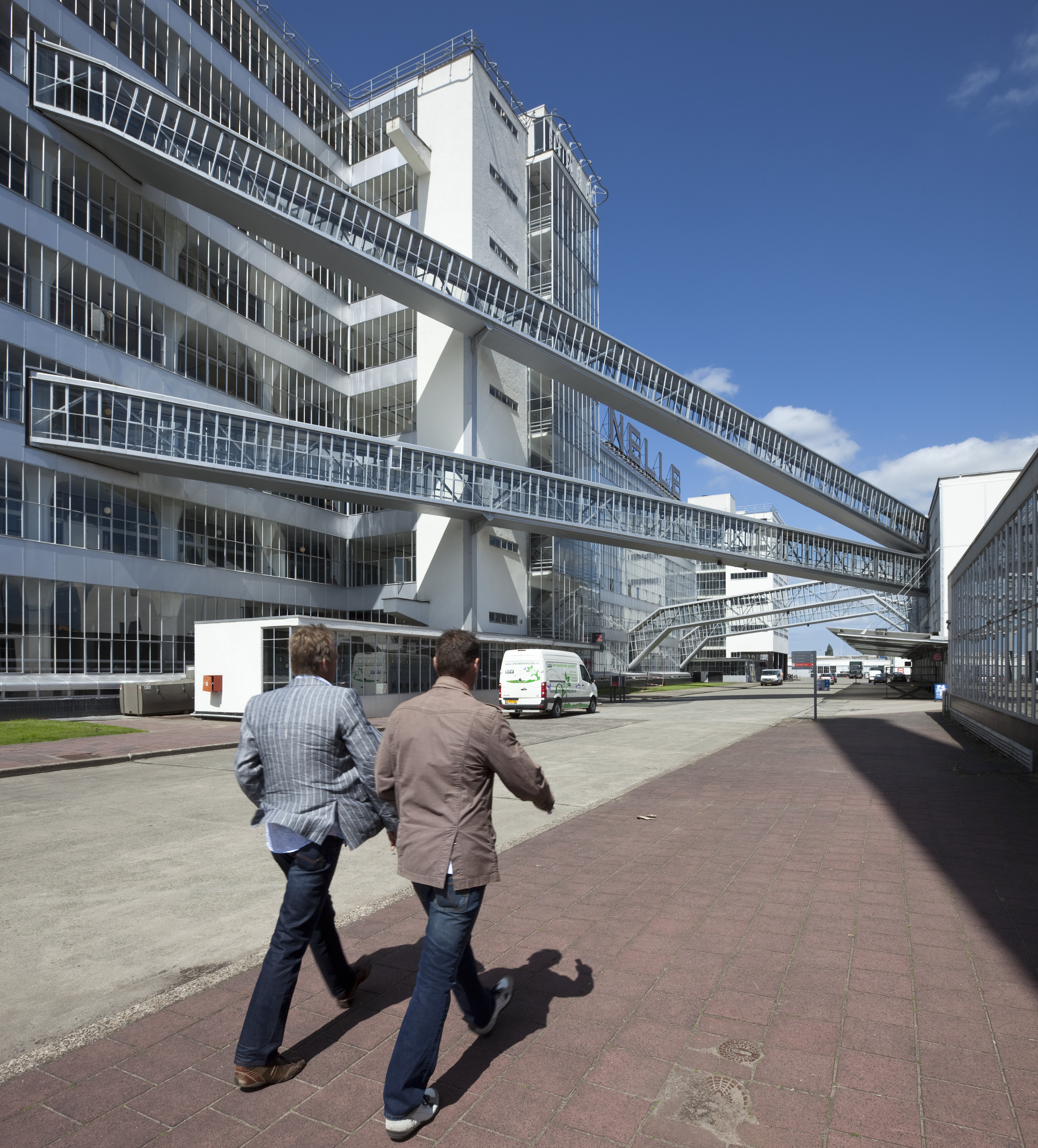 (voormalige) Van Nellefabriek, - Fabriekscomplex: Overzicht van de gevel van de fabriek met luchtbruggen met transport-inrichtingen van de tabaksfabriek naar het expeditiegebouw (Schiegebouw)